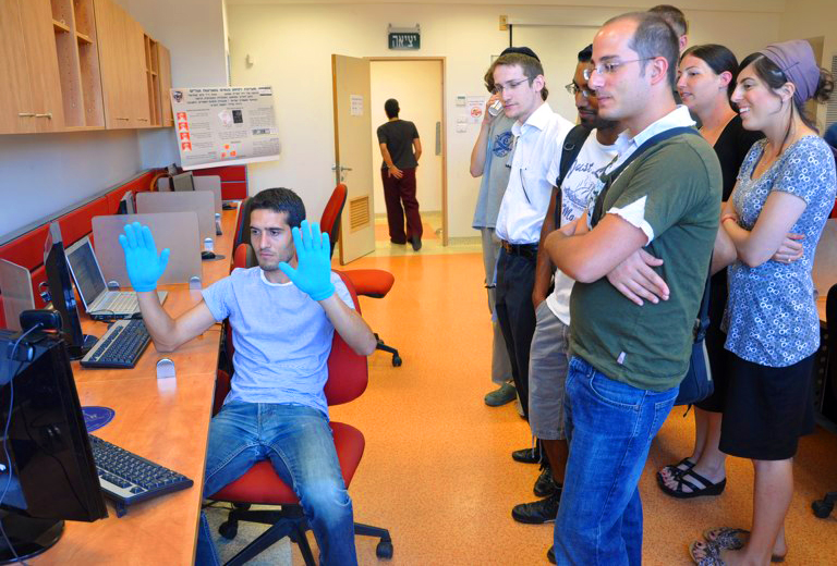 מעבדת החוג למדעי המחשב במכללת הדסה